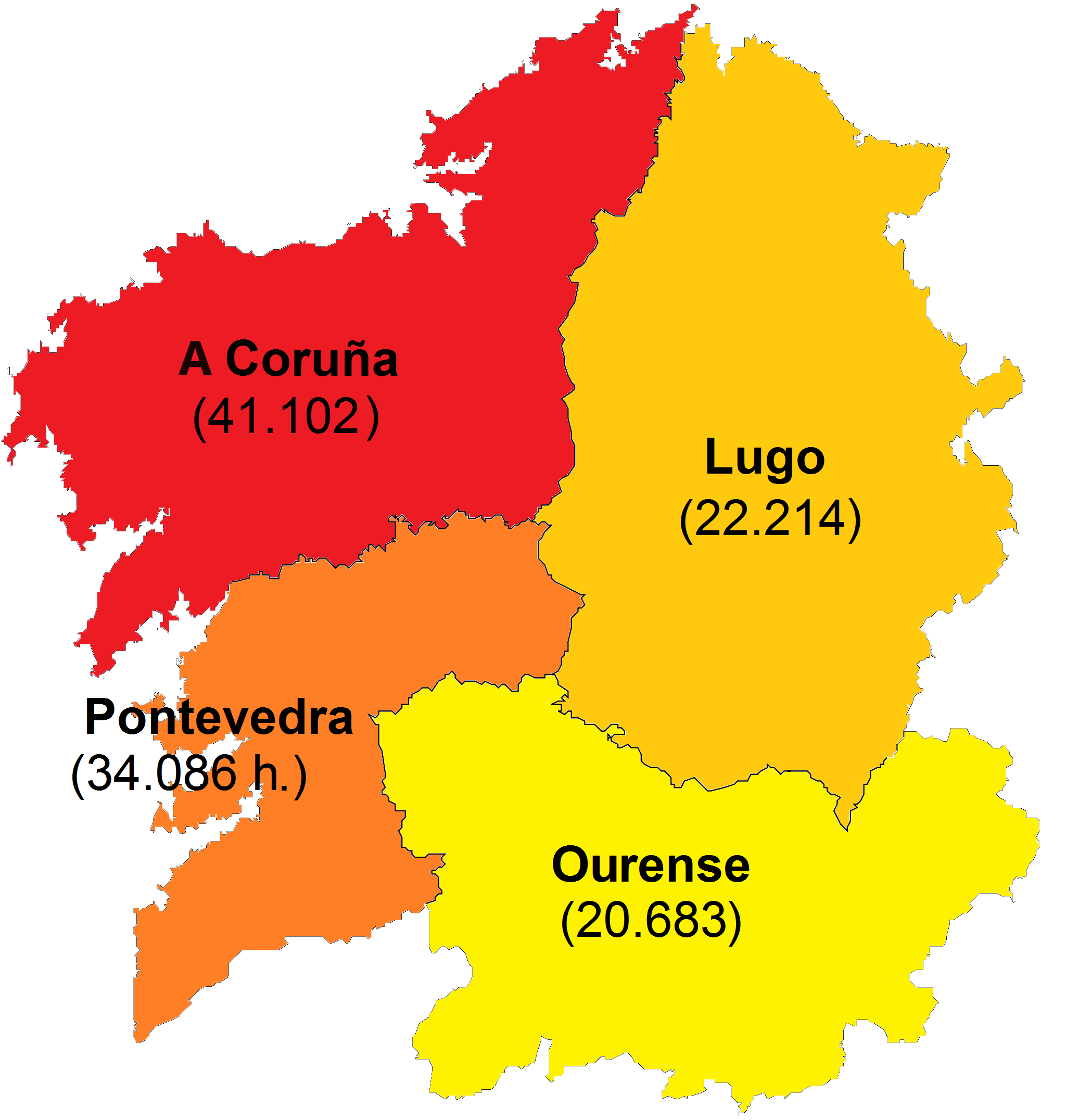 Gallegos en Argentina - Regiones de orígen (2008) Fuente: Censo electoral de galegos residentes no estranxeiro: últimos datos, evolutivo, por provincia de inscrición e país de residencia - Galicia Abierta